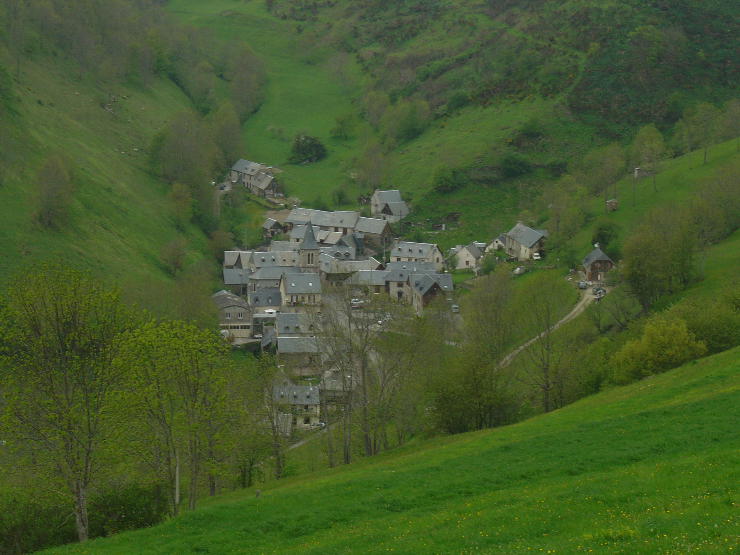 Village d'Aspin-Aure vu depuis la route du col d'Aspin